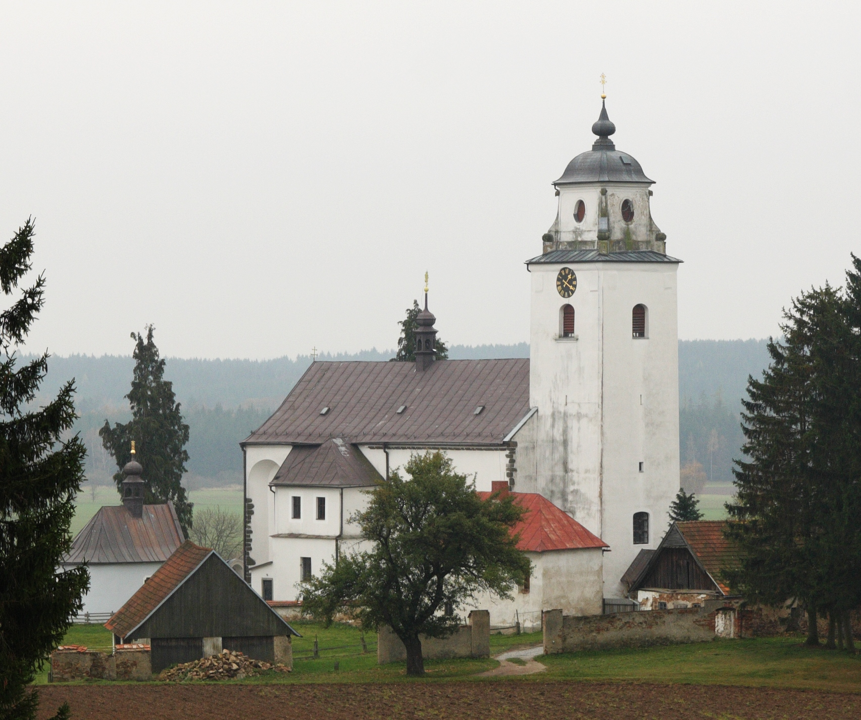 Netín - kostel Nanebevzetí Panny Marie, pohled od severu